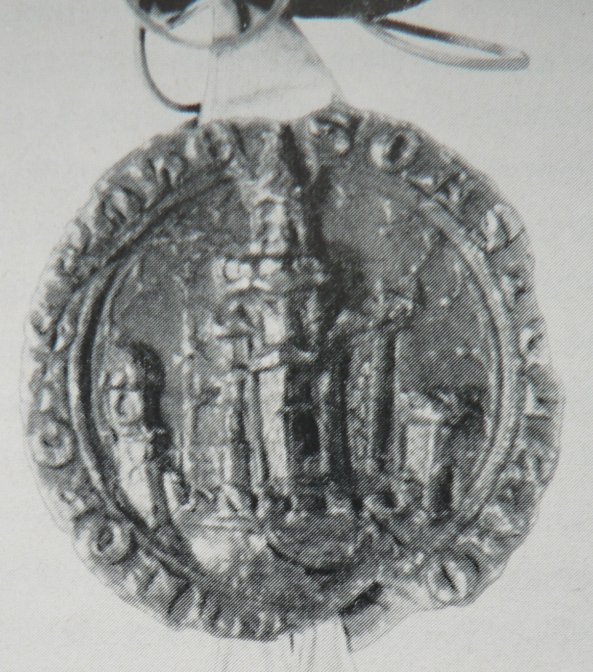 Wappen der Meller Burgmänner (Diözesanarchiv Osnabrück)